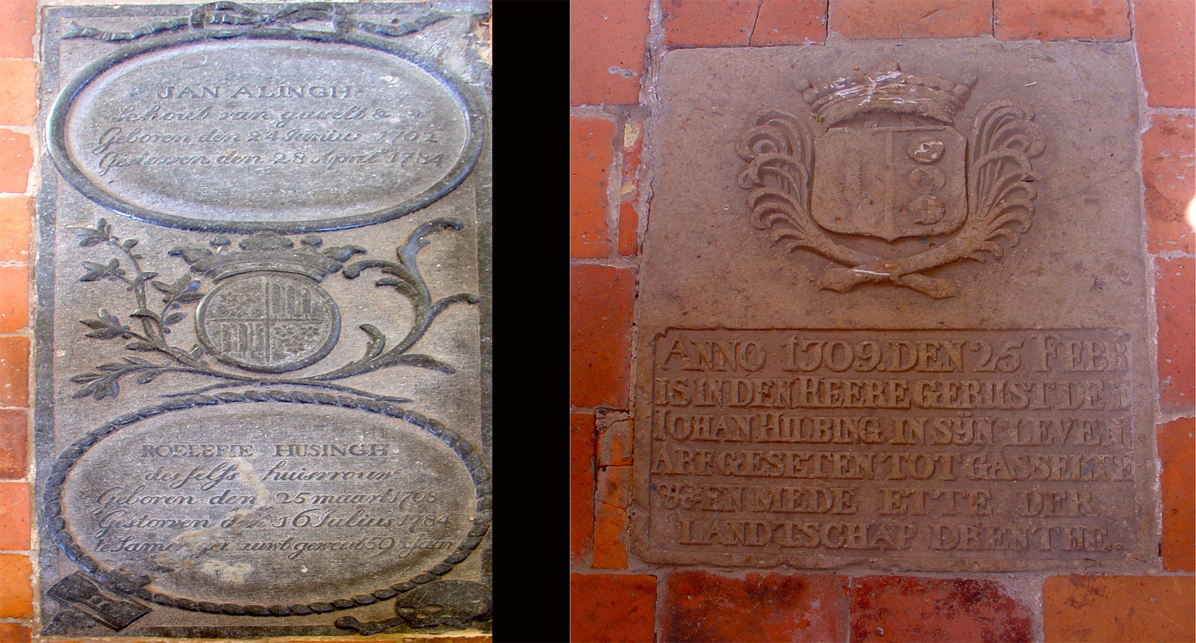 Grafzerken van Jan Alingh (1702-1784), Roelefie_Huising en Johan Hilbing (1655-1709) in de kerk van Gasselte